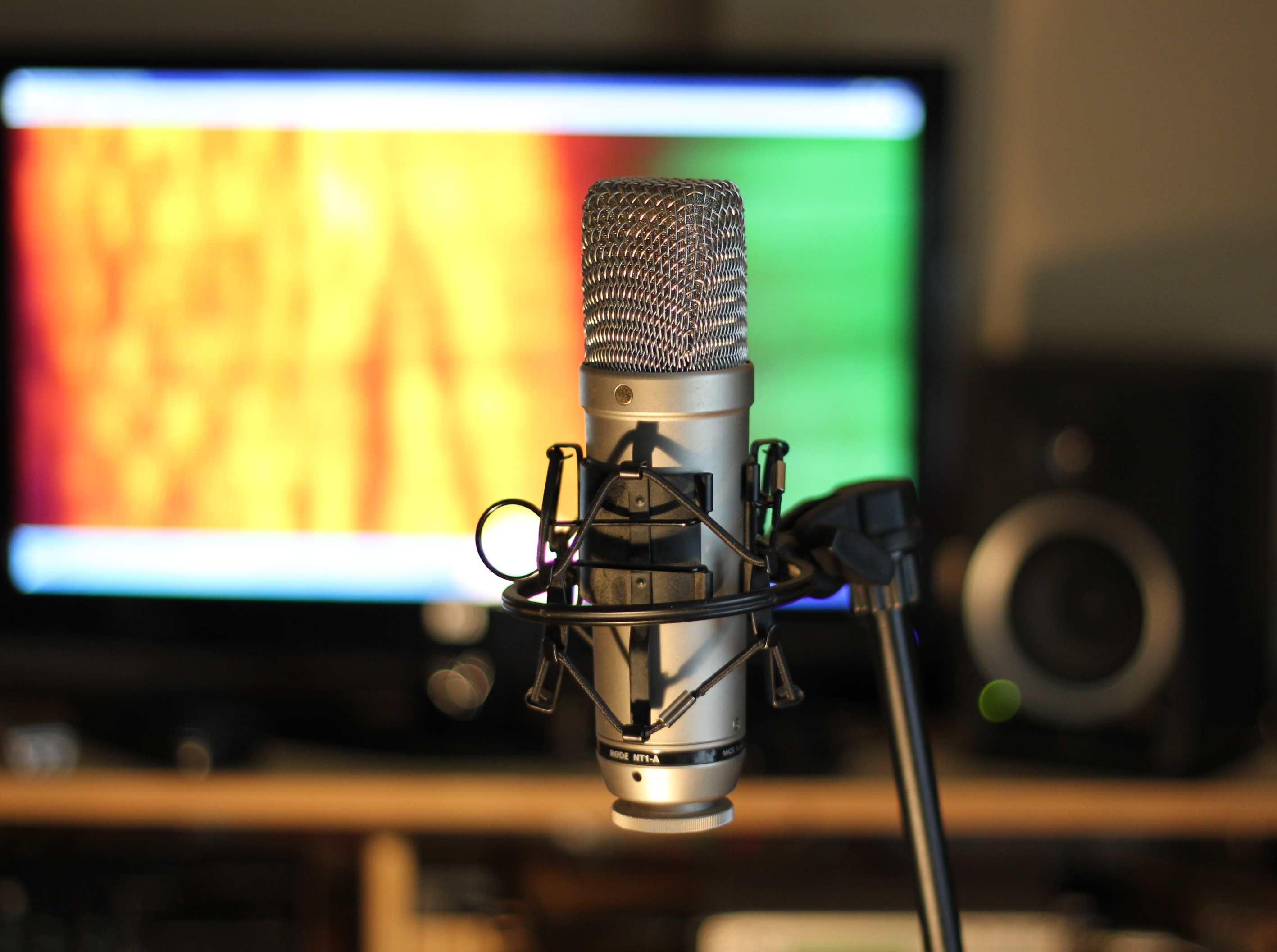 Condersatormicrofoon